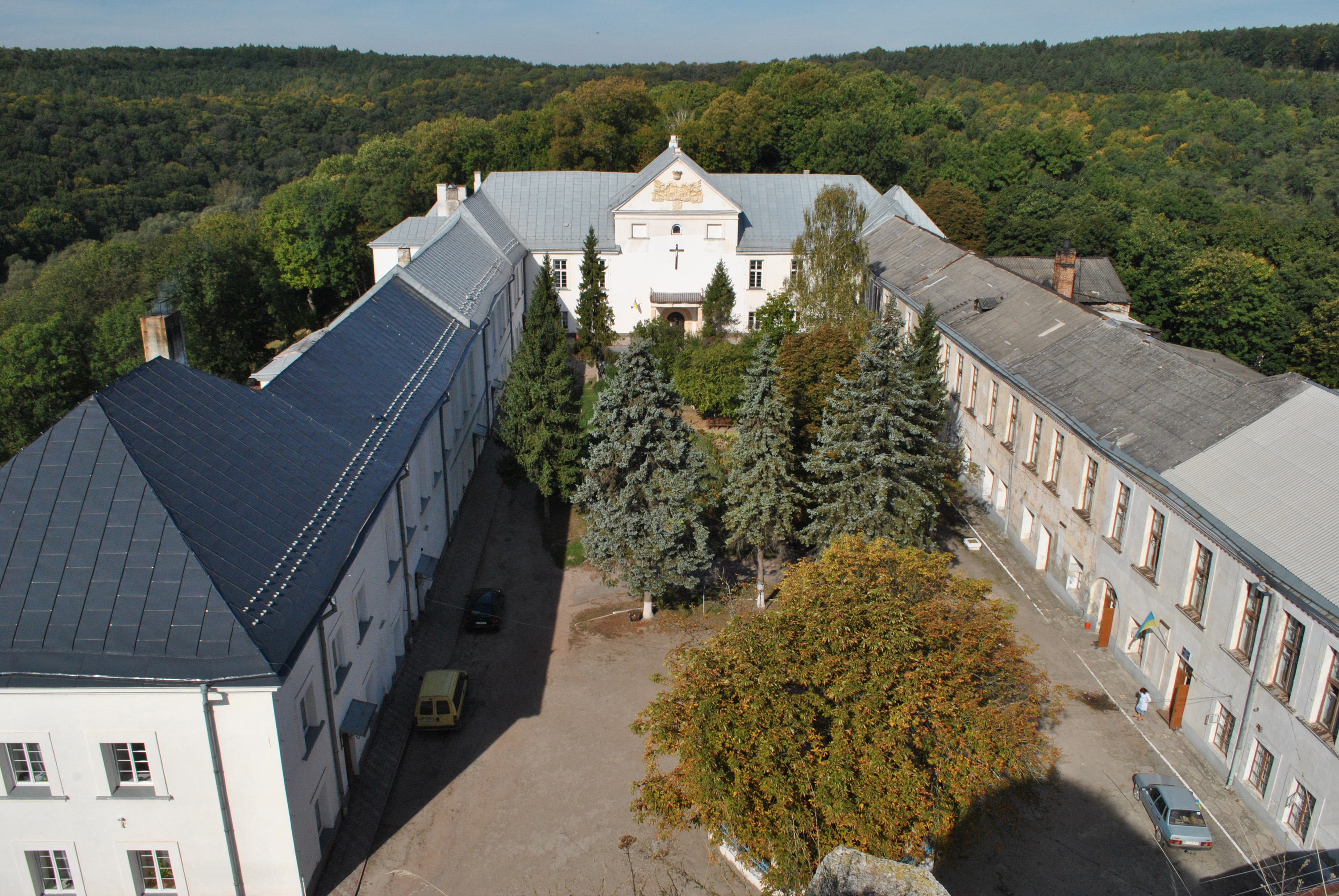 Палац XVII-XVIII ст. (мур.) у селі Язловець Бучацького району Тернопільської області. Вид на палац із замку.